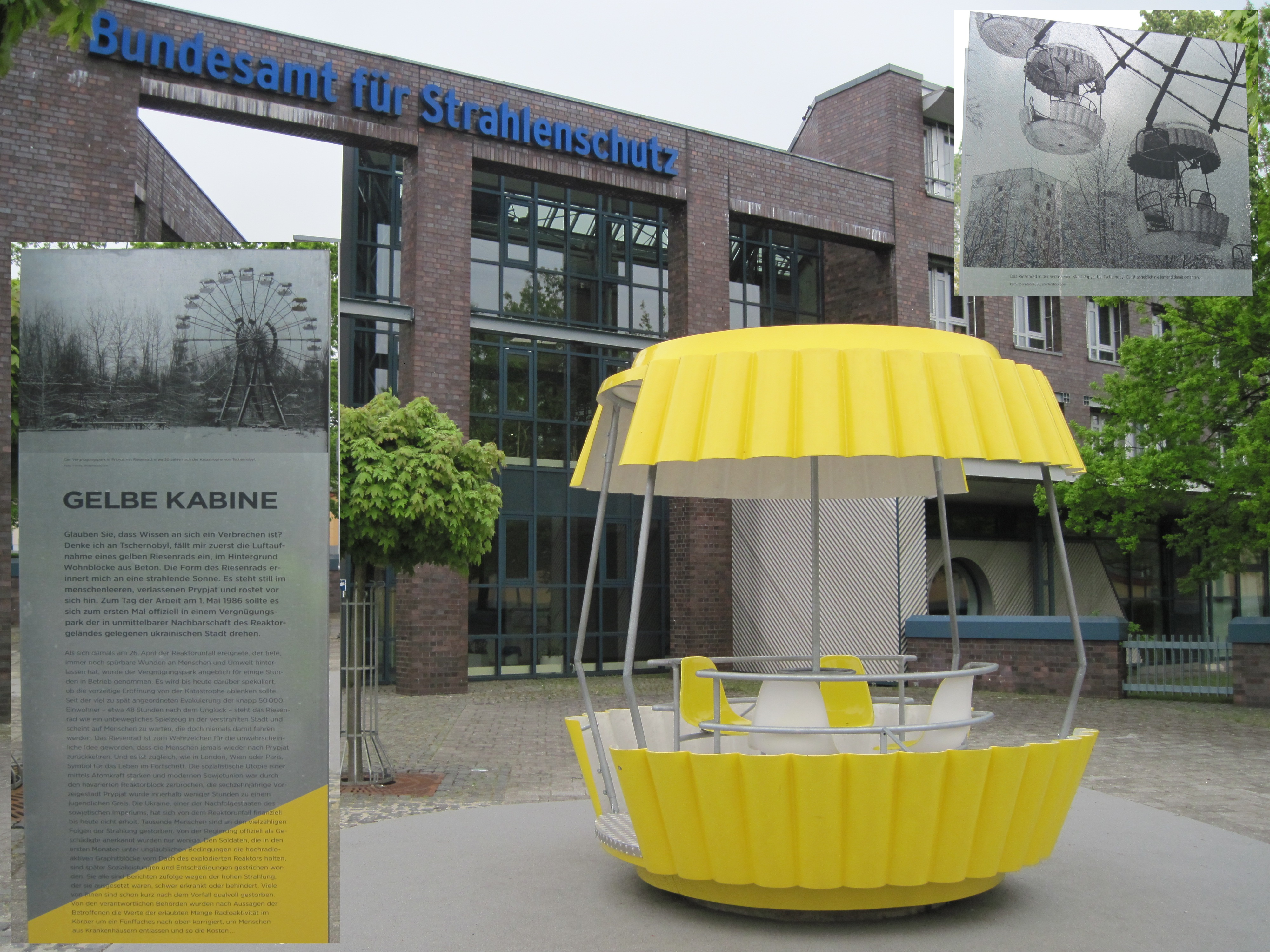 "Gelbe Kabine" vor dem Haupteingang des BfS in Salzgitter-Lebenstedt. Es ist ein Nachbau der Gondeln des Riesenrades in der wegen des Reaktorunglücks von 1986 aufgegebenen einstigen modernen Stadt Prypjat. Zudem befinden sich daneben eine Informationstafel mit Fotos + Beschreibungstext.